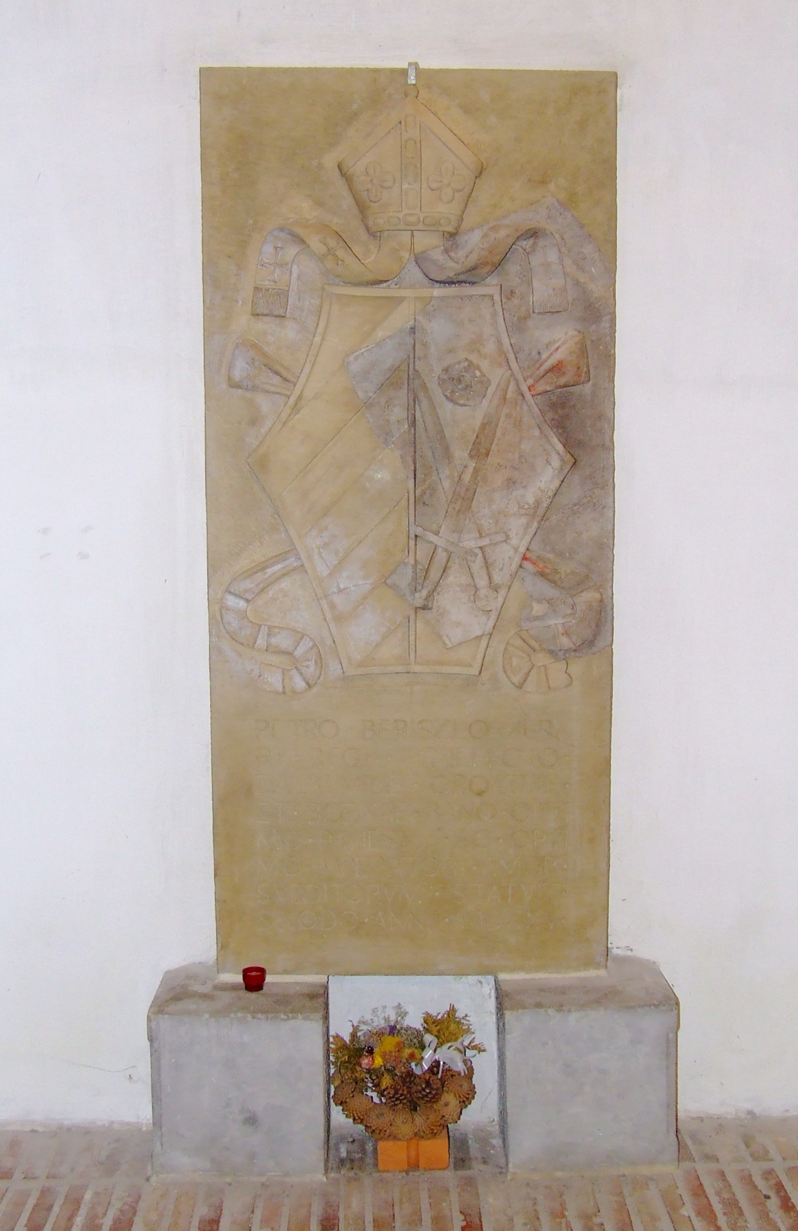 Beriszló Péter (1475 körül – 1520) horvát bán, hadvezér, veszprémi püspök sírköve a veszprémi Szent Mihály-székesegyházban